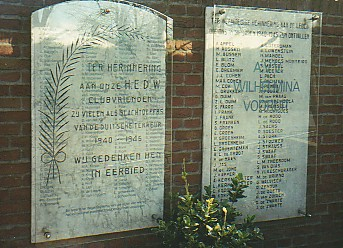 WV-HEDW Monument Na 55 jaar eert het monument nu toch nog alle slachtoffers: 67 Wilhelmina Vooruit leden, 162 met name genoemde HEDW leden, en 7 niet met name genoemde HEDW leden "van wie wij het lot niet met zekerheid hebben kunnen vaststellen".